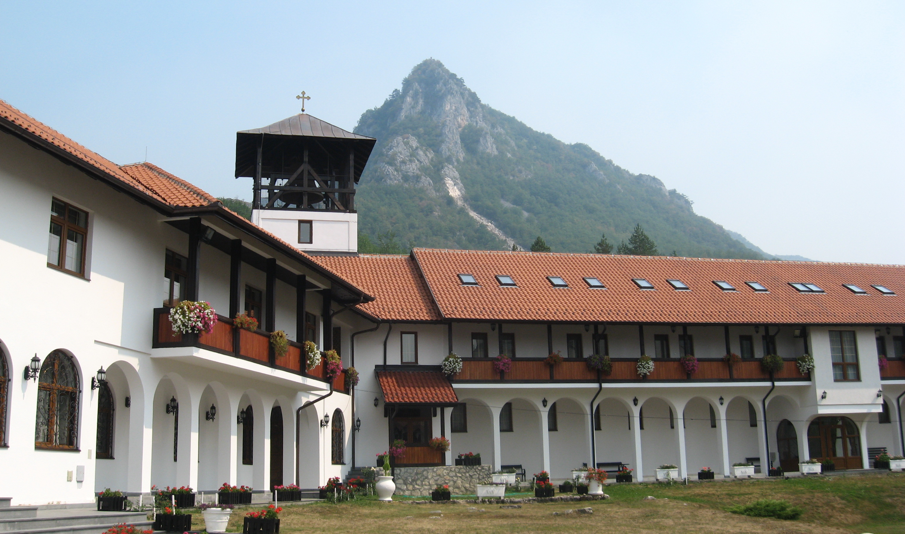 Snimak ostataka srednjovekovnog grada Mileševac je napravljen iz dvorišta manastira Mileševa